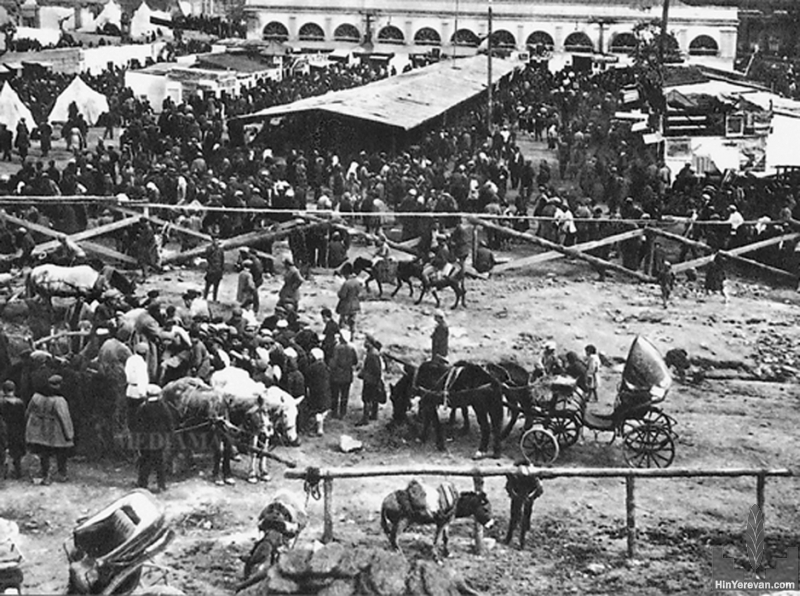 Ղանթարի շուկա